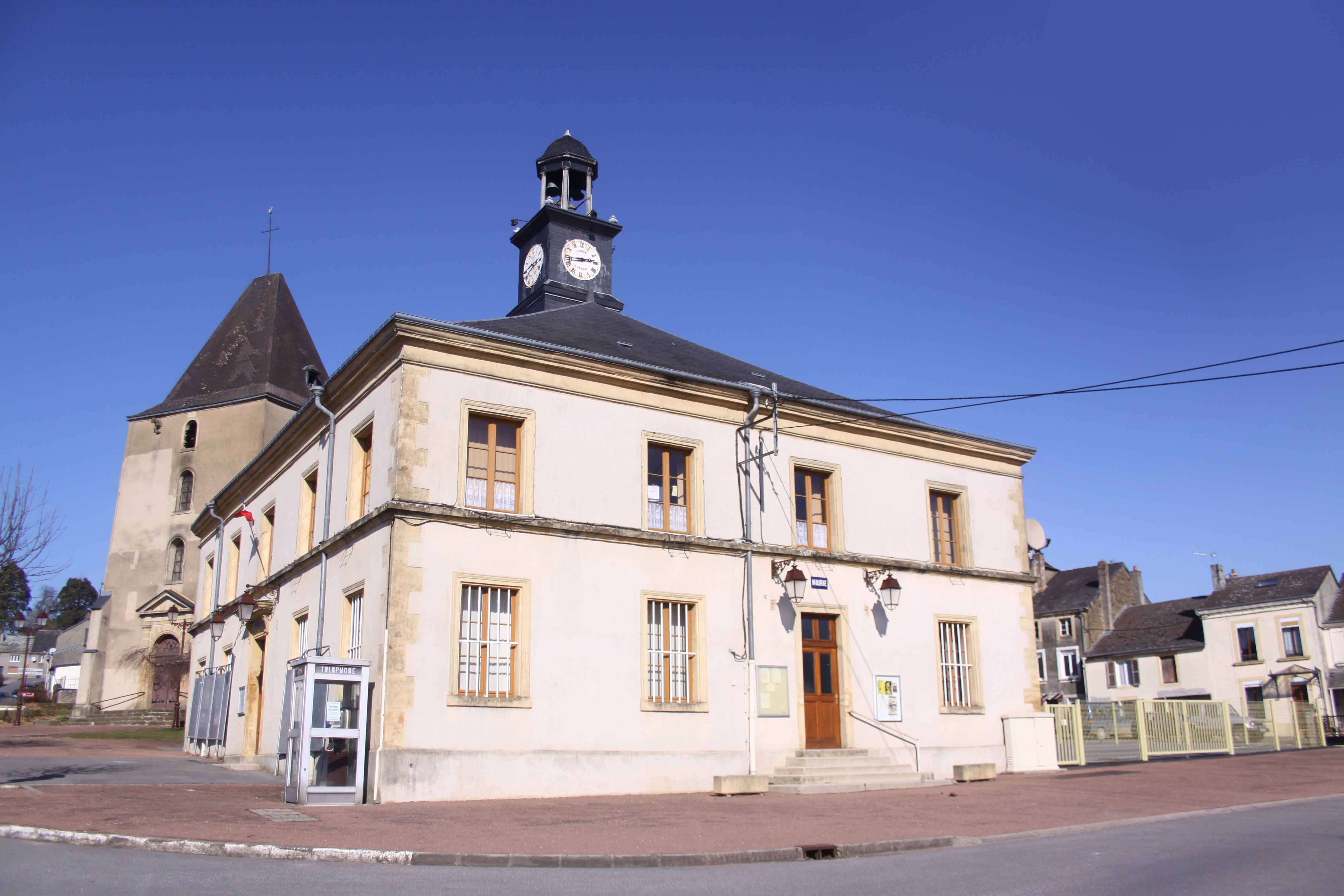 Village Ardennais